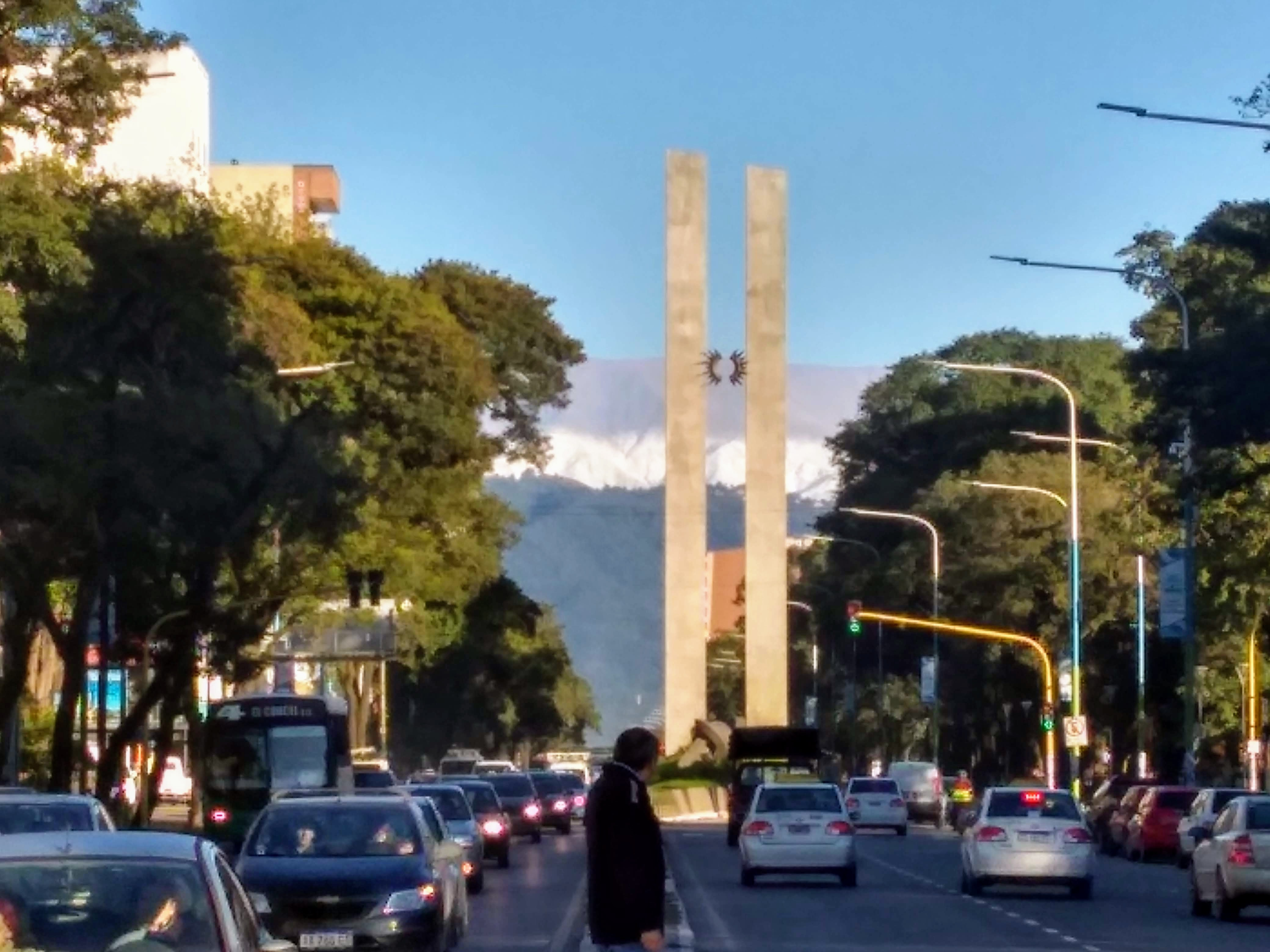 Este monumento fue creado en San Miguel de Tucumán el año 2016, al cumplirse los 200 años de la declaración de la independencia de Argentina, en la ciudad en que se declaró la misma en 1816. Está ubicado en avenida Mate de Luna 1600, una de las principales vías de comunicación de la ciudad. El monumento consiste en dos columnas de hormigón, de más de veinte metros de altura que representan la bandera argentina. Entre las dos estructuras, puede visualizarse el sol. Las columnas tienen una pequeña curvatura; según la perspectiva desde donde se lo mire, emula a la bandera flameando. Al pie del monumento se encuentran dos estructuras de acero simbolizando cadenas rotas en honor a la libertad obtenida. Allí mismo fue enterrada una urna “cápsula del tiempo” en la que se encuentra un libro firmado por miles de tucumanos. El proyecto consiste en desenterrarlo para los festejos del Tricentenario de la Independencia. La imagen fue tomada un día después de haber nevado en el cerro San Javier (al fondo de la imagen). Se ven los cerros nevados, generando la percepción de una segunda bandera en posición horizontal.